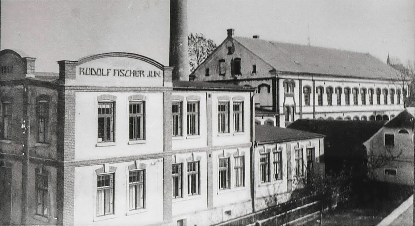 Mikulášovice na dobových záběrech